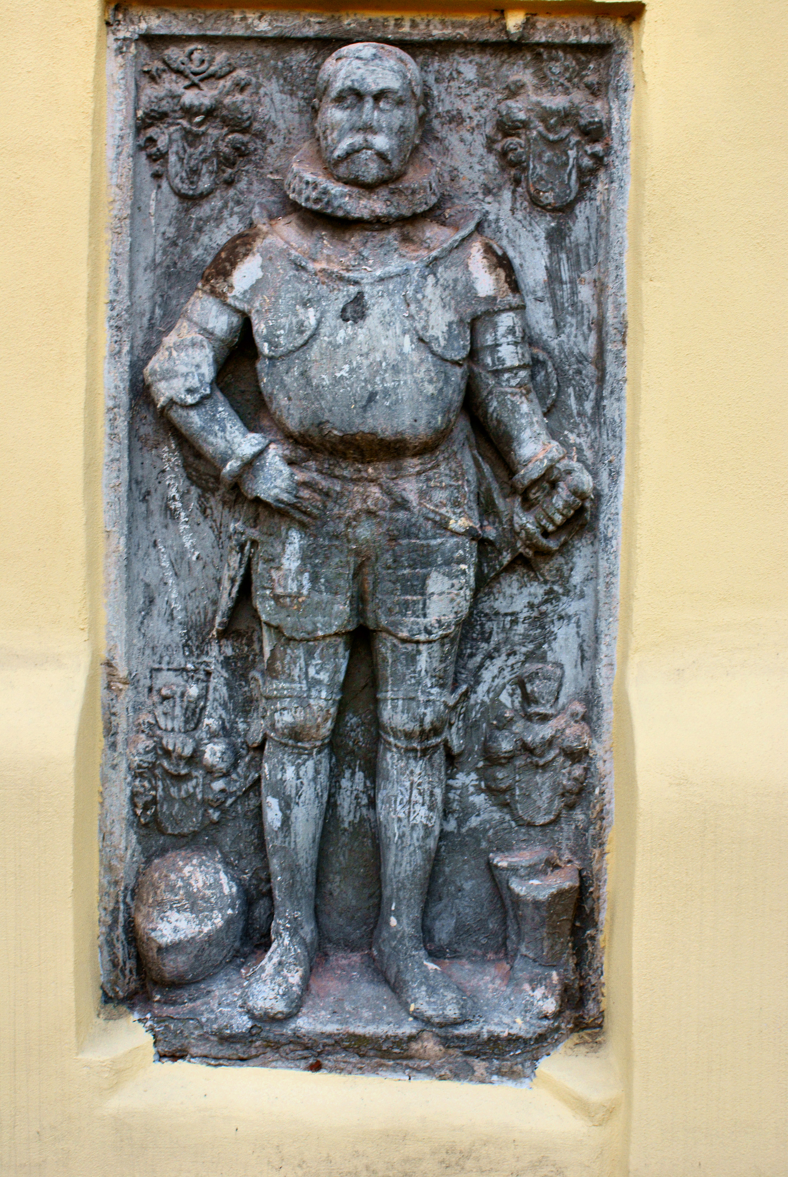 Grębocice - kościół parafialny św. Marcina (zabytek nr rejestr. A/1629/122)